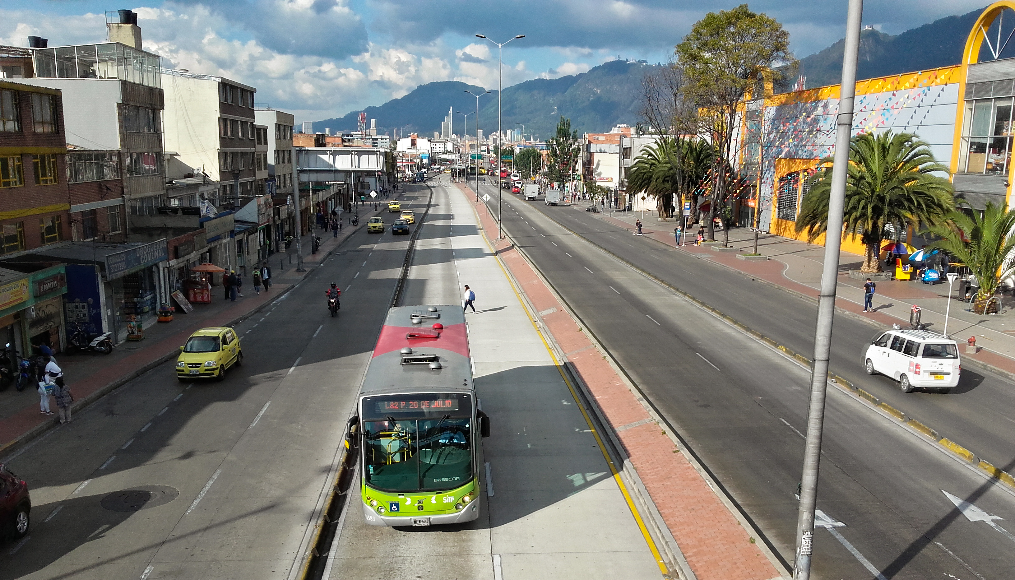 xnnfndnfnfnfnf